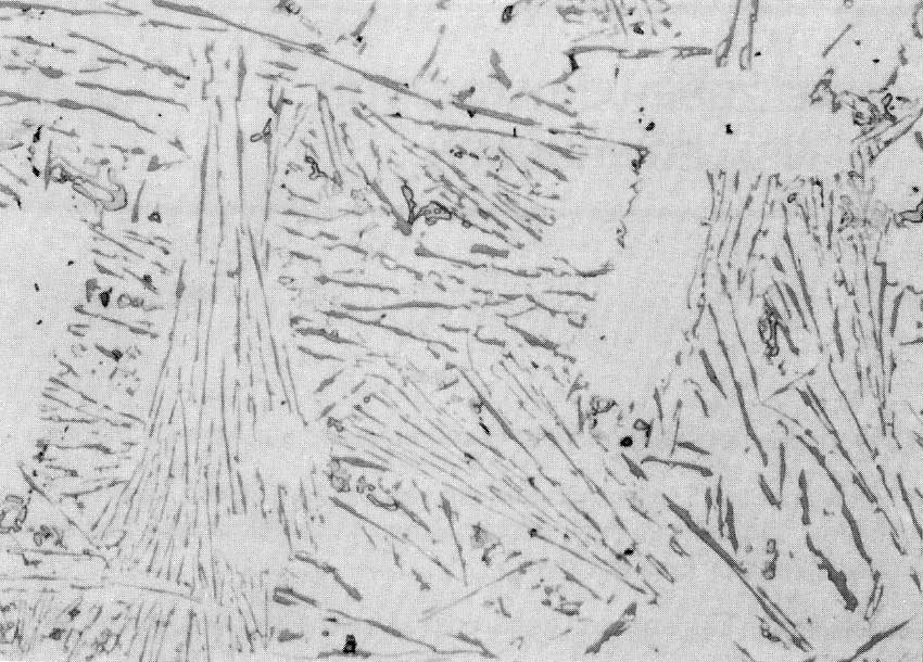 AlSi-Legierung (G-AlSi 12) unveredelt